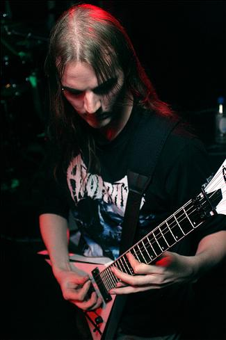 Camden Underworld